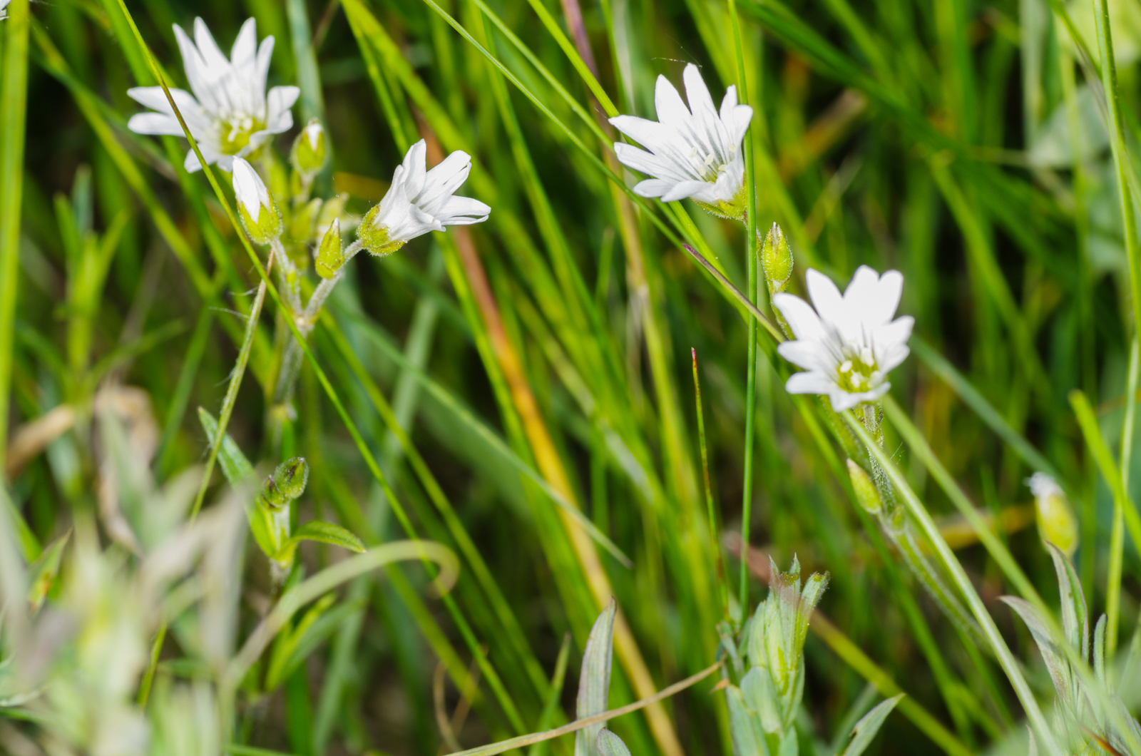 Národní přírodní památka Křížky, rožec kuřičkolistý, okres Cheb